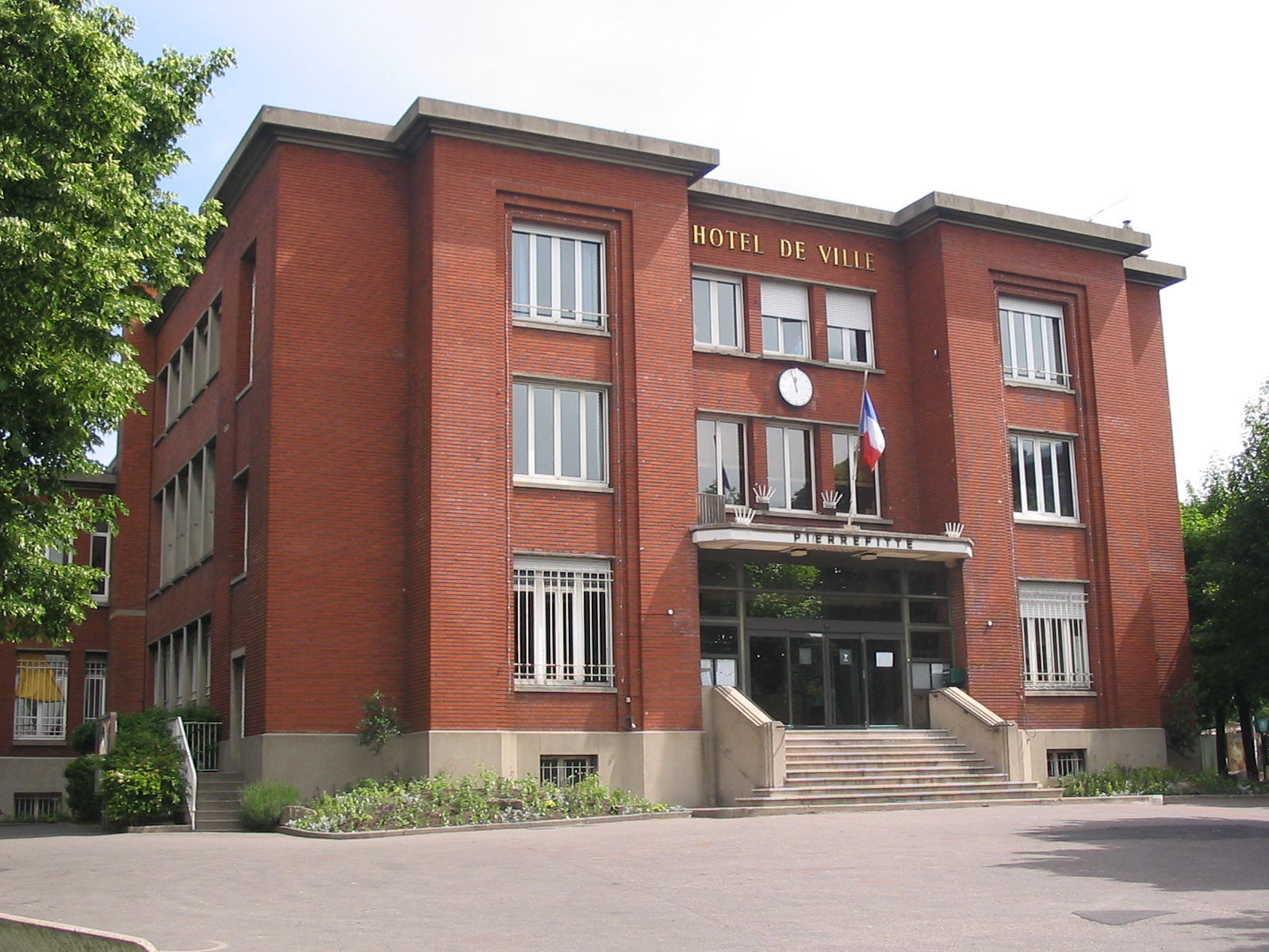 Mairie de Pierrefitte-sur-Seine (93). Je suis l'auteur du cliché pris au printemps 2005 Licensing Catégorie:Pierrefitte-sur-Seine